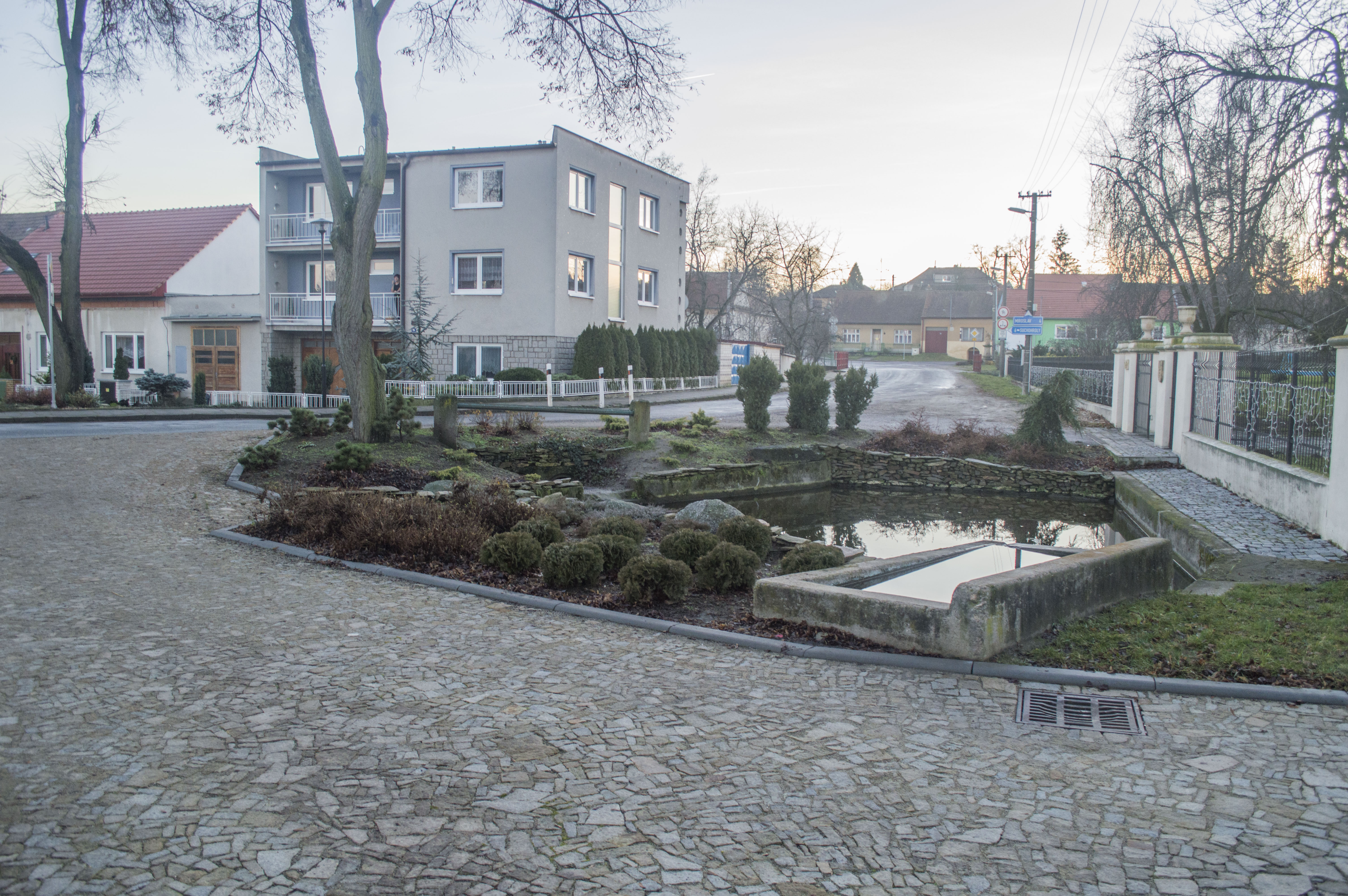 Bývalé napajedlo na návsi v Miroslavských Knínicích.